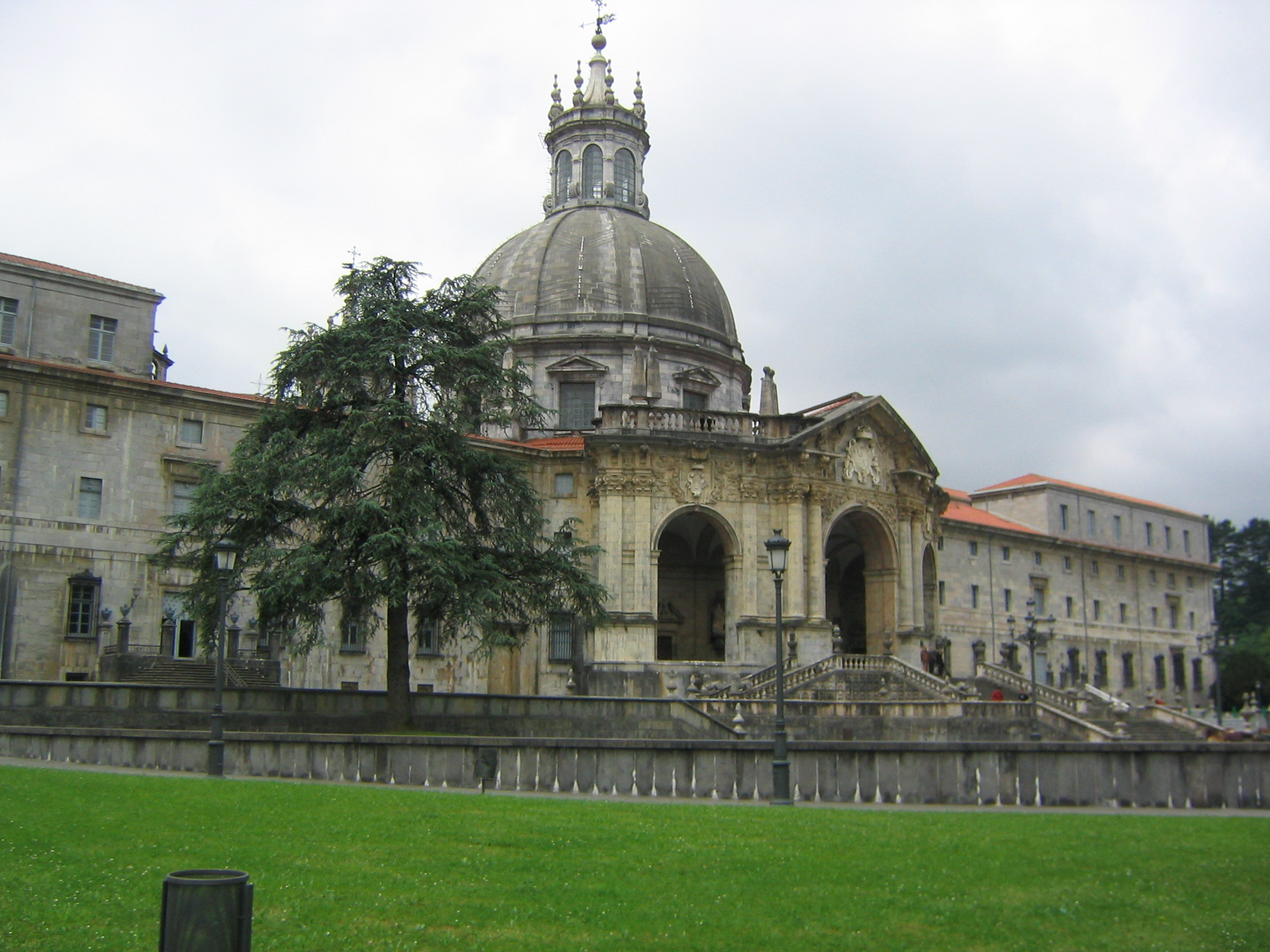 Vista general. Santuario de Loiola, Azpeitia. Guipúzcoa, País Vasco (España).